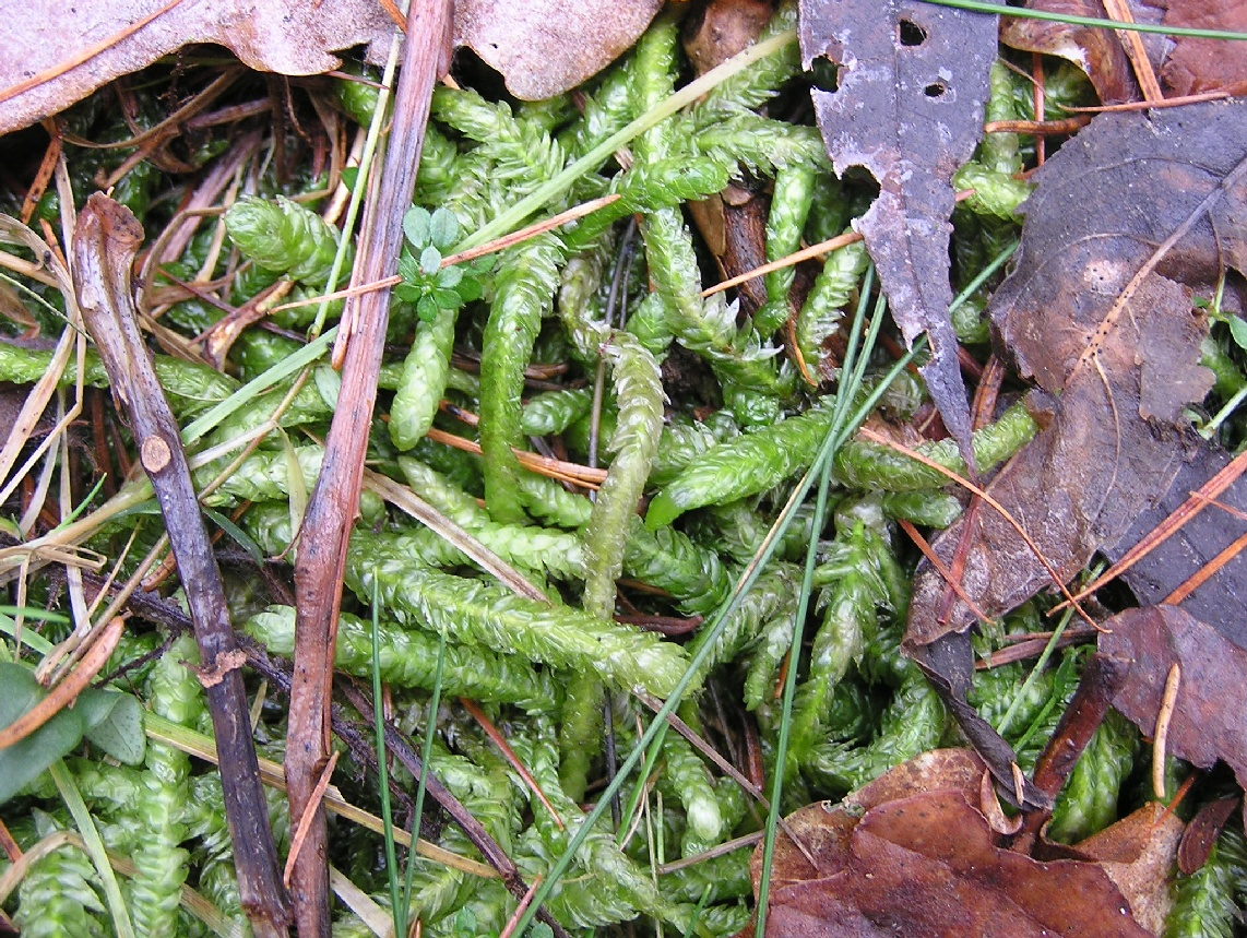 Plagiothecium undulatum auf Waldboden bei Schladern an der Sieg.